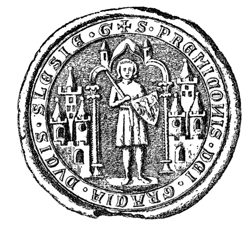 Przemko Ścinawski seal